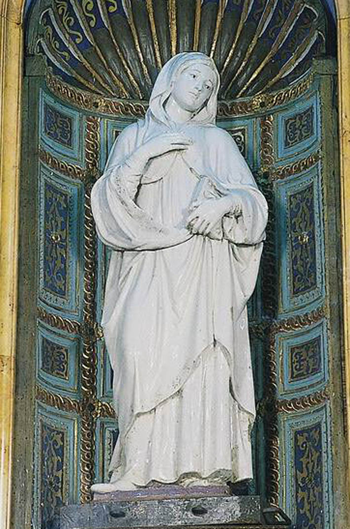 Cappella della Madonna di Vitaleta, San Quirico d'Orcia